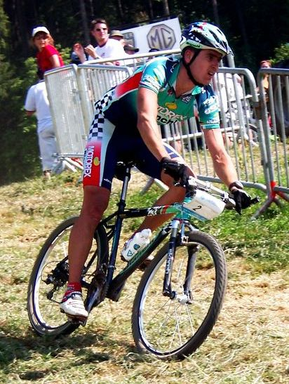 Julien Absalon au championnat de France 2003 de VTT cross-country à Métabief.